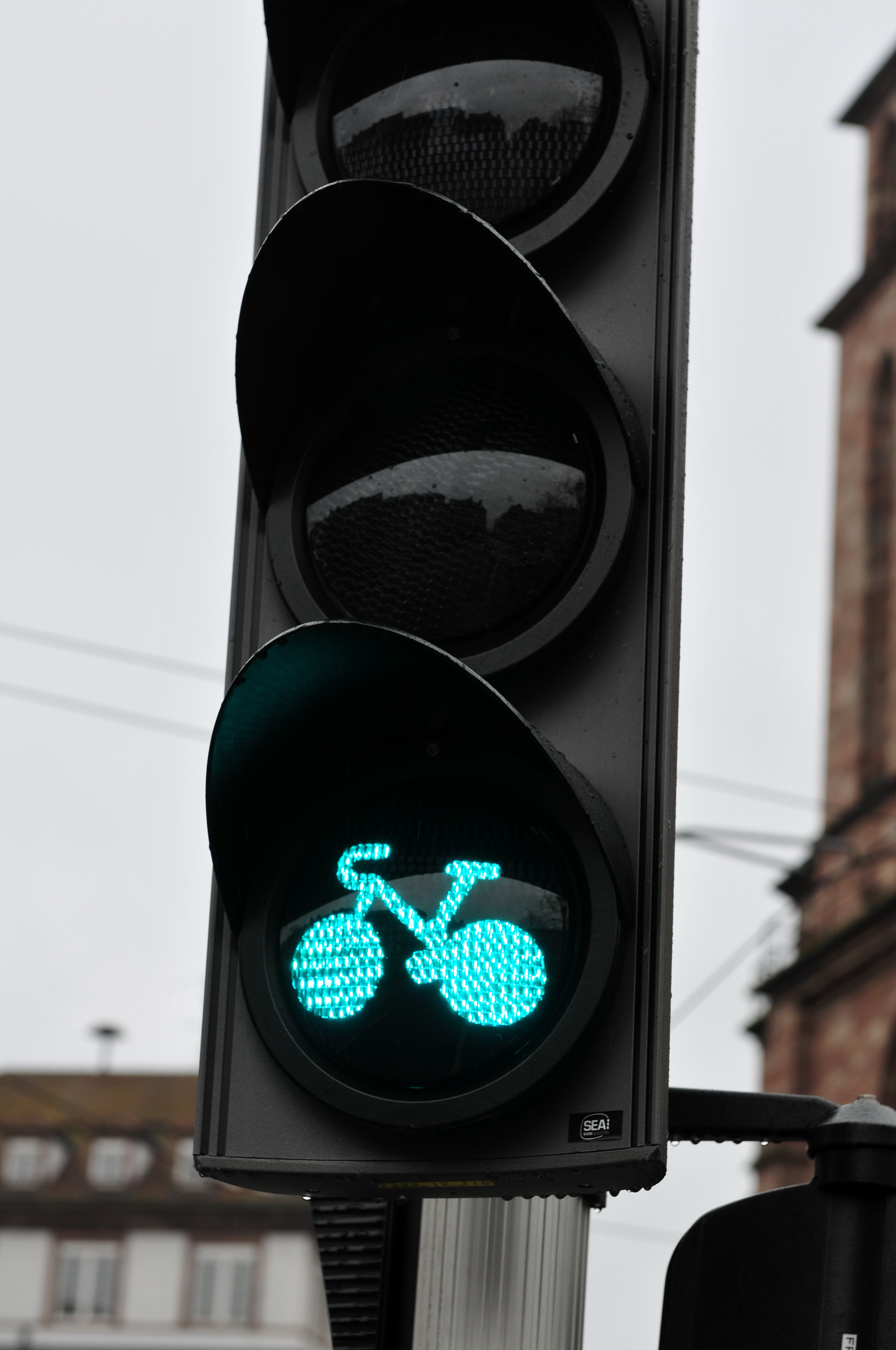 Straßburg European Parliament 2014 3.–7. February 2014, StrasbourgThis photo has been created within the project "WIKI loves parliaments / European Parliament". Usage and Help If you have any questions concerning this picture or how to use it, feel free to